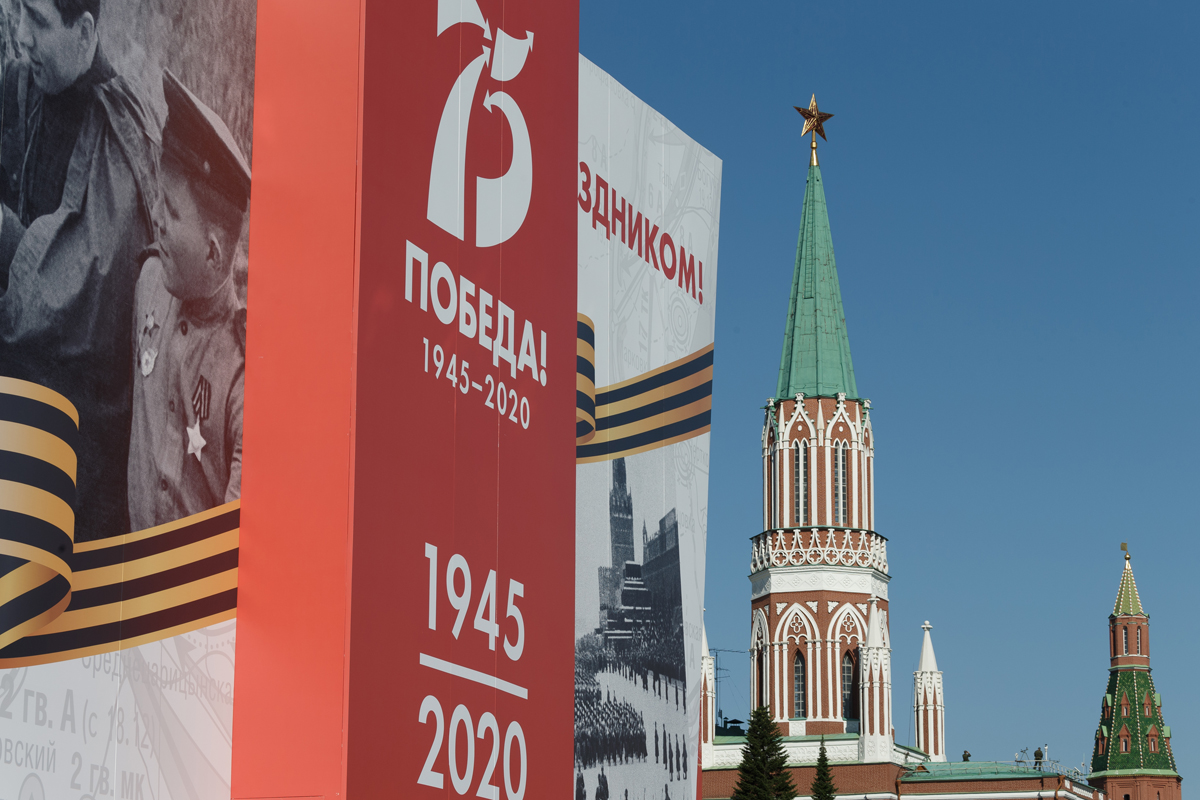 Парад Победы в Москве, посвященный 75-й годовщине Победы в Великой Отечественной войне